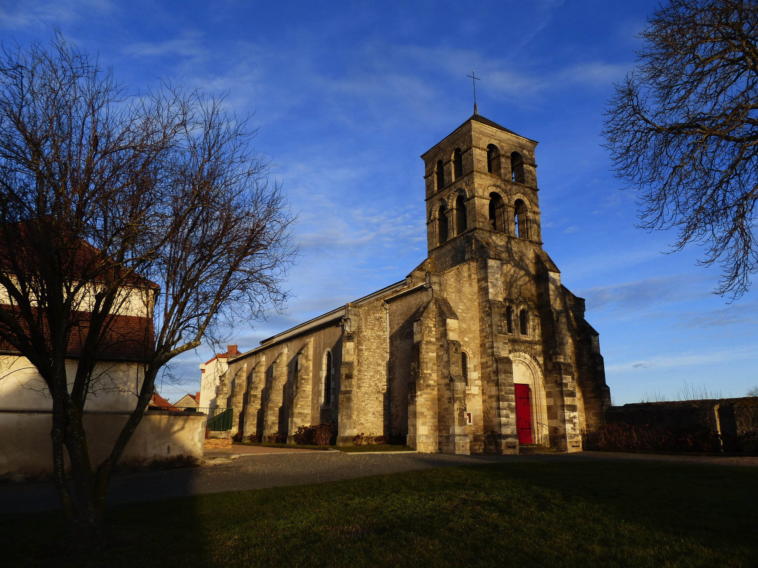 Saint-Bonnet-de-Rochefort (Allier, France). Église. À gauche, côté de la mairie (ancien presbytère).